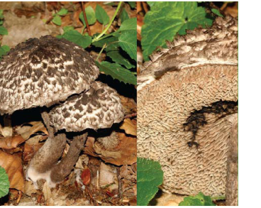 гриб роду боровиковий. Рідкісний вид, для якого характерне наземне утворення плодових тіл.